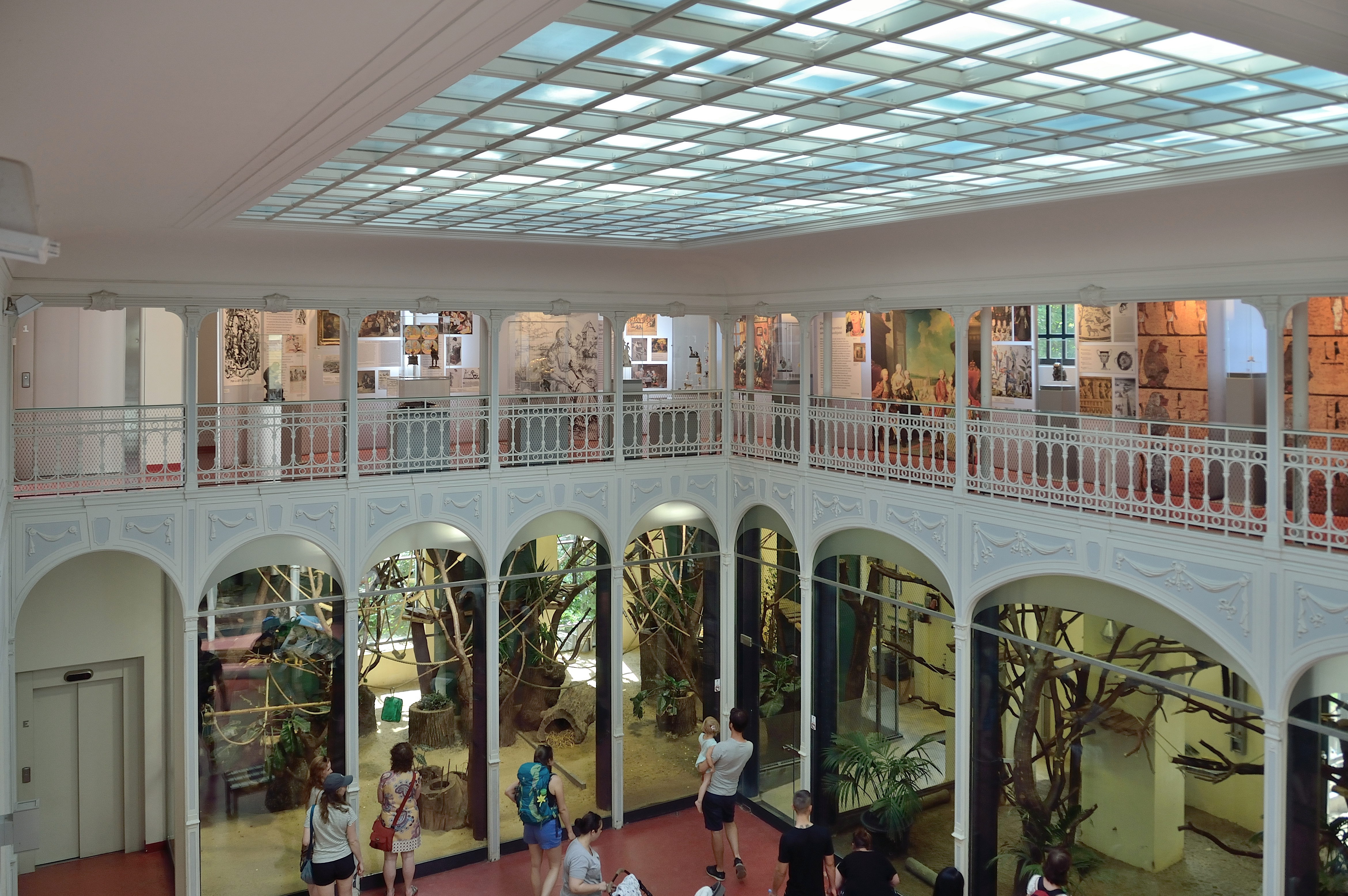 Innenansicht des Affenhauses im Tiergarten Schönbrunn.